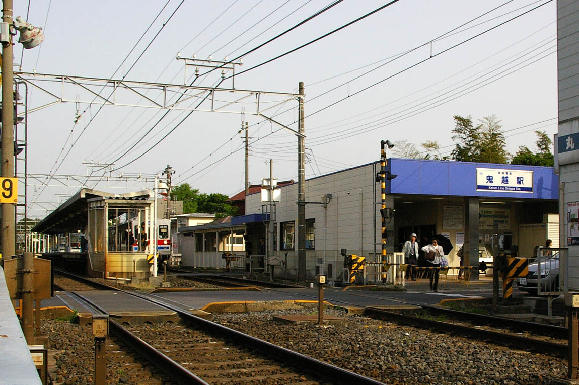 鬼越駅 2005年4月30日投稿者撮影 Category:京成電鉄の画像 Category:鉄道駅画像